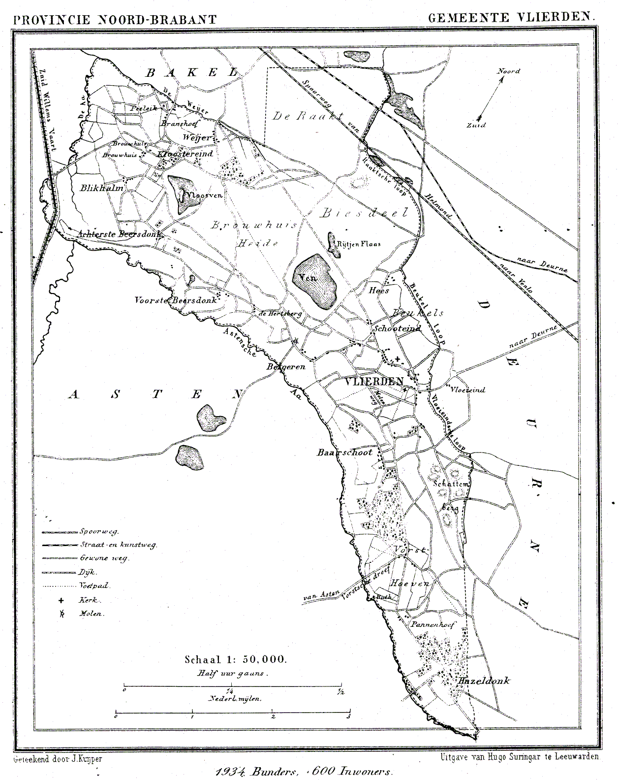 Nederland, Noord-Brabant, Gemeente Vlierden